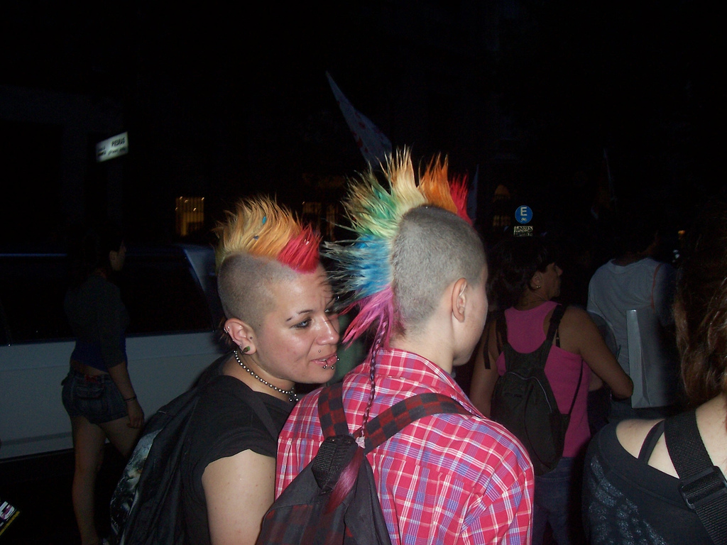 XVI Marcha del Orgullo Gay en Buenos Aires. Gay pride parade in Buenos Aires.